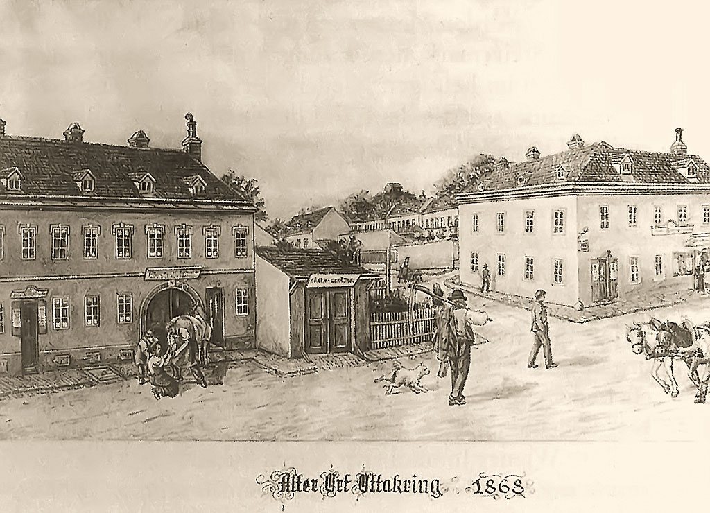 de: Ansicht von Alt Ottakring, Lithogeaphie von Trentsensky, 1868